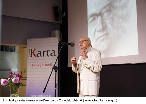 10 czerwca 2017, Dom Spotkań z Historią, Warszawa. Jubileusz urodzin Wiktora Woroszylskiego i premiera I tomu dzienników wydanych nakładem wydawnictwa. Na zdjęciu Jacek Bocheński. W tle zdjęcie Wiktora Woroszylskiego.